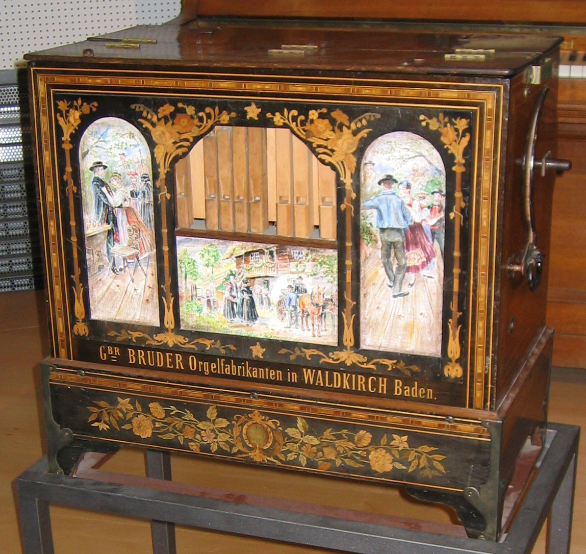 Drehorgel mit Stiftzylinder, 12 Melodien und 25 Tonstufen hergestellt um 1860 von den Gebrüdern Bruder in Waldkirch